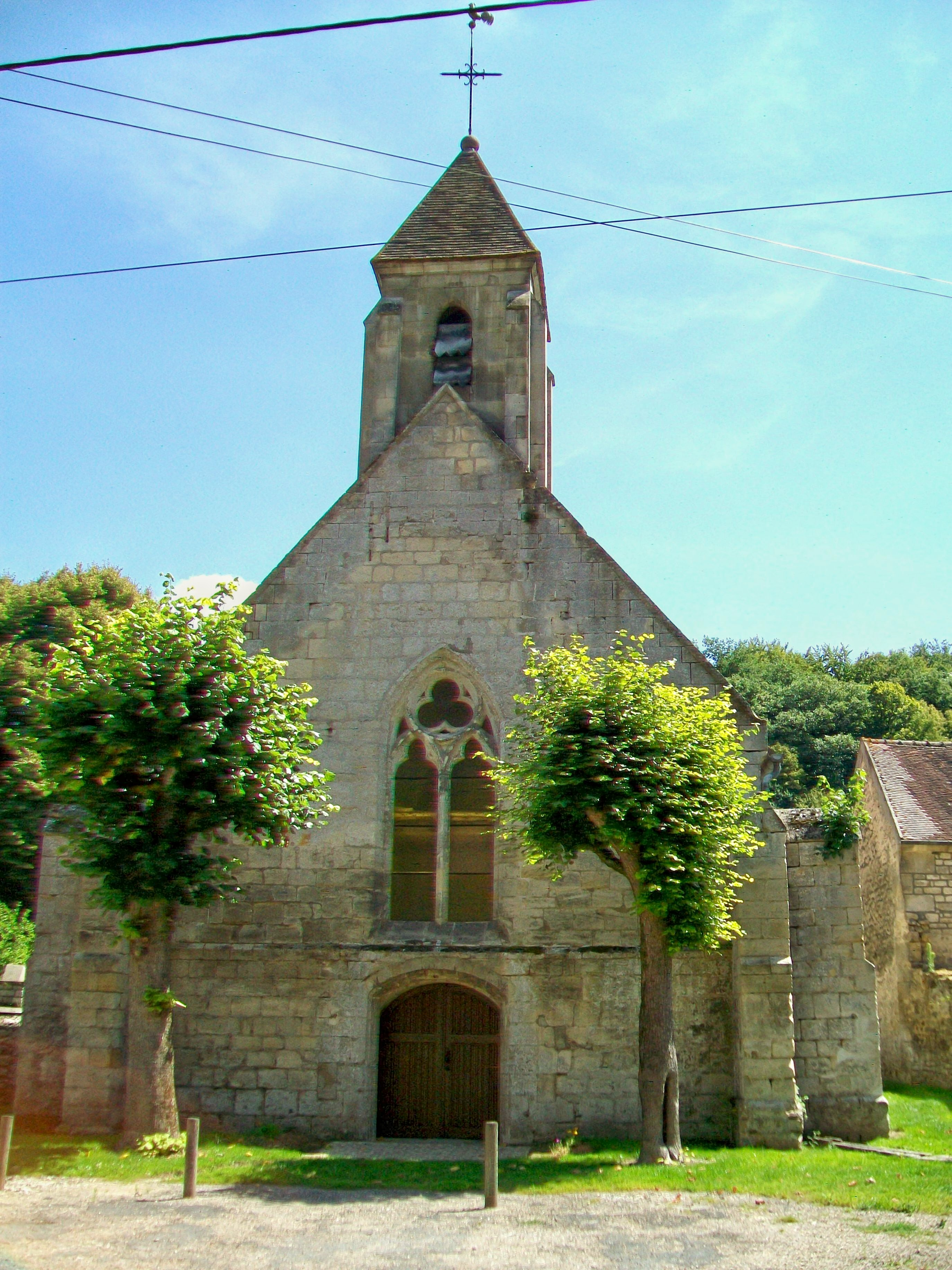 La façade ouest de l'église Saint-Didier. Les autres façades donnent sur des étroites venelles.